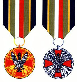 Złoty i Srebrny Medal Wojska Polskiego